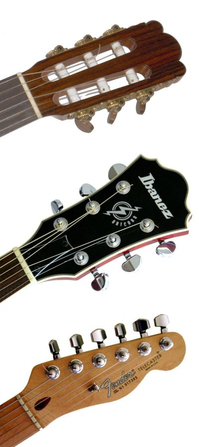 Különböző típusú gitárok hangolófeje: klasszikus, akusztikus, elektromos gitár